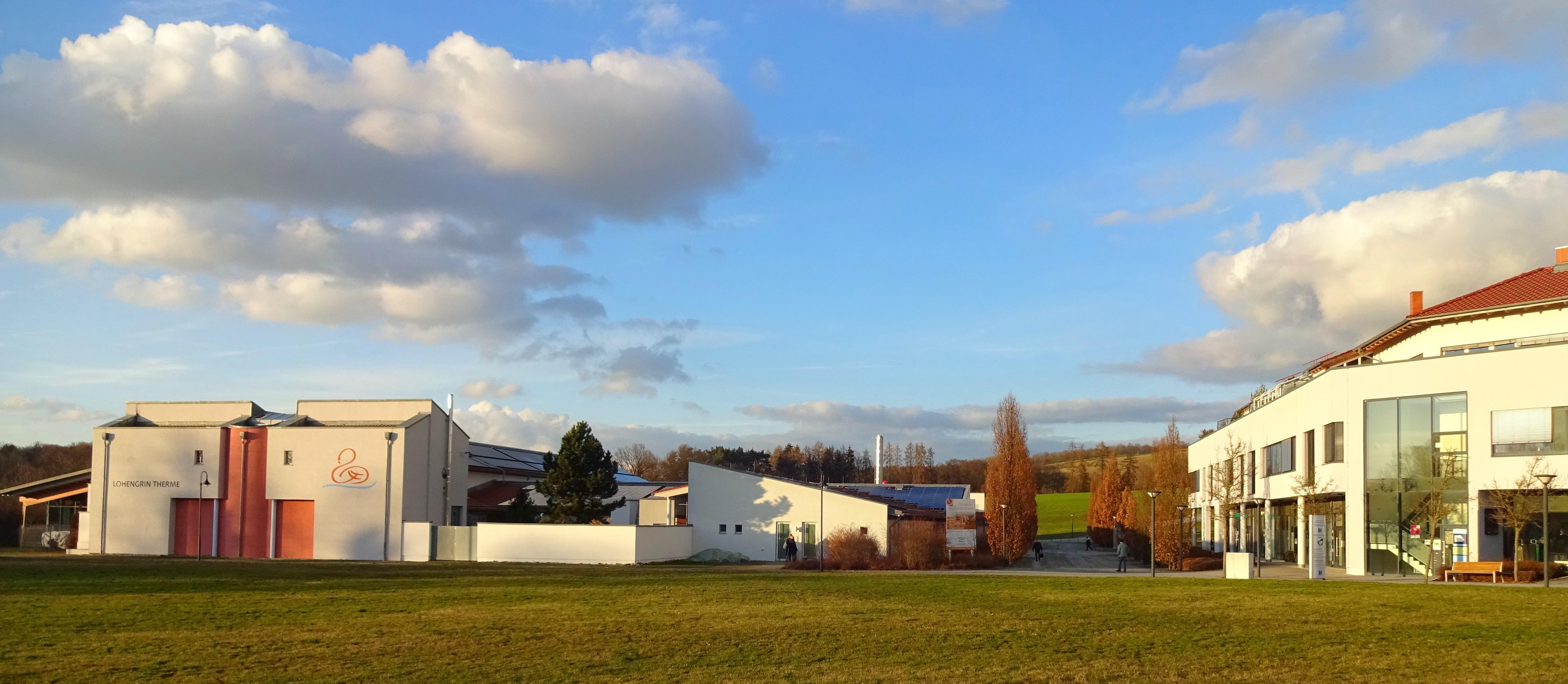 Links die Lohengrin-Therme, rechts das Gesundheitszentrum Bayreuth an der Lohengrin-Therme im Bayreuther Ortsteil Seulbitz.